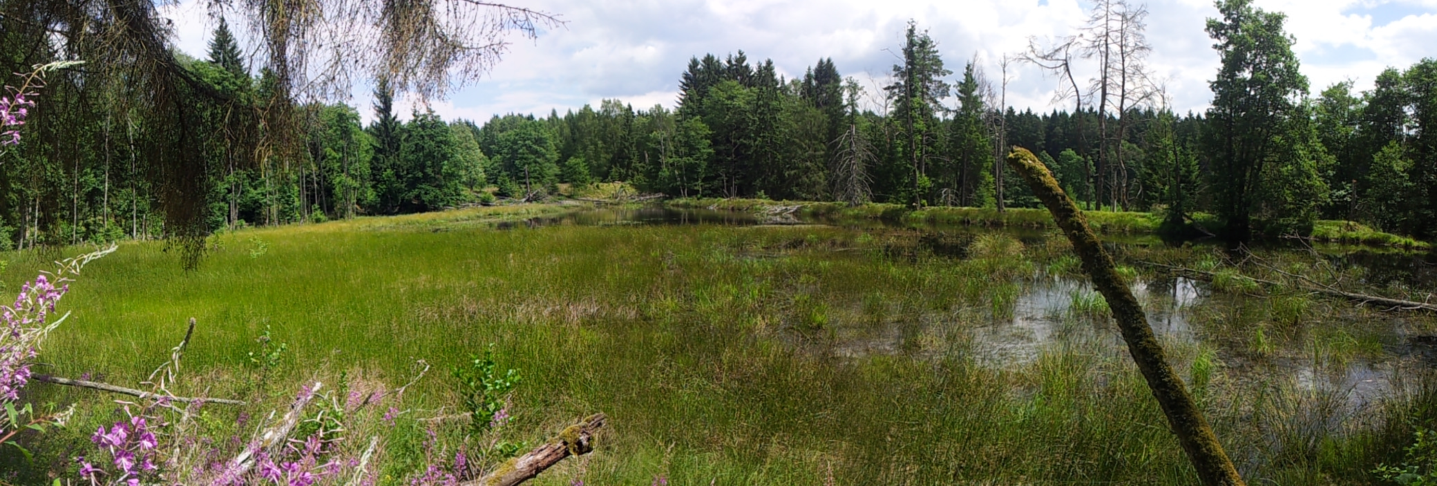 Přírodní památka Na Kolmu